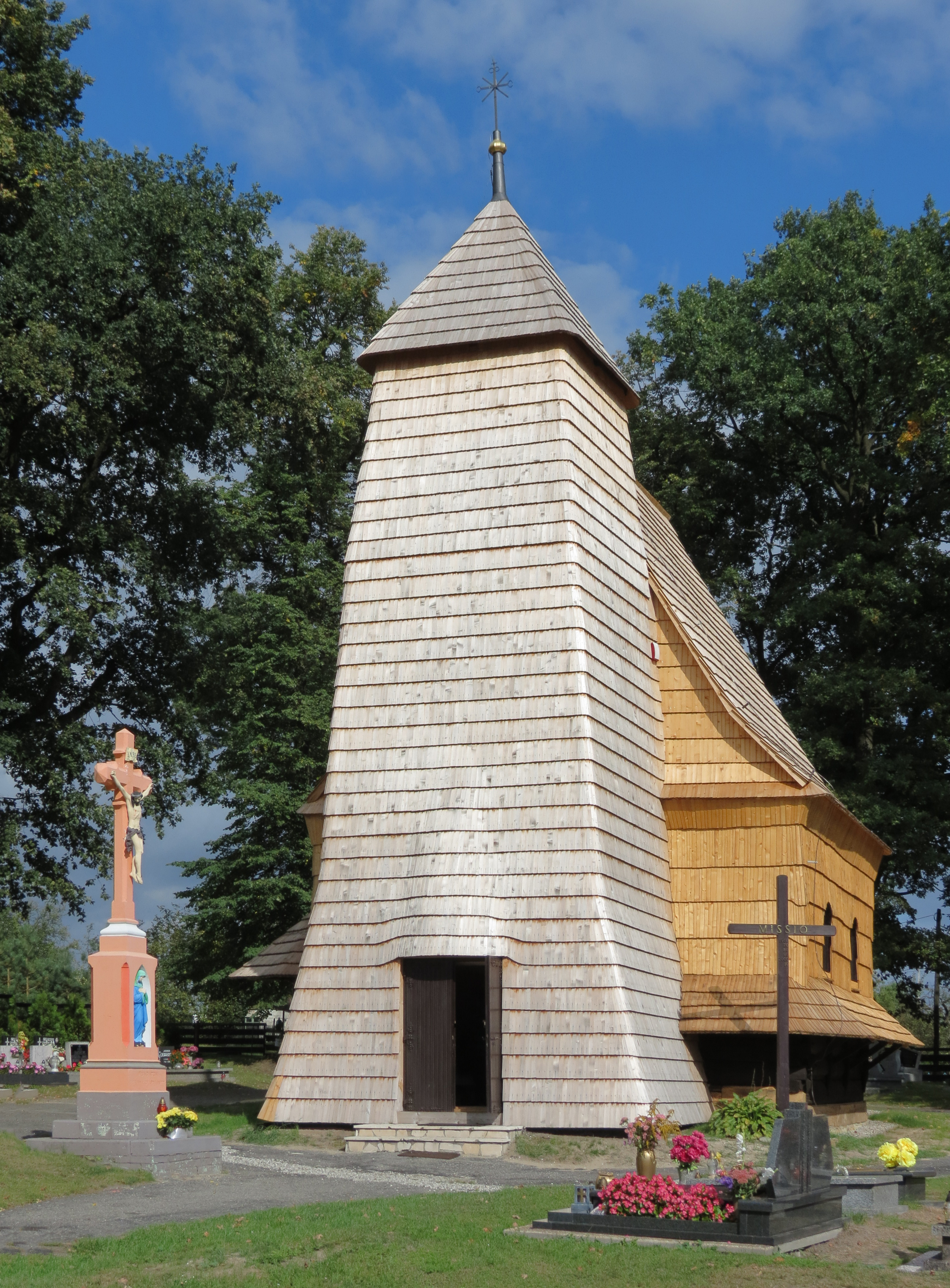 Kościół parafialny p.w. św. Wawrzyńca; Zacharzowice, ul. Wiejska, gmina Wielowieś